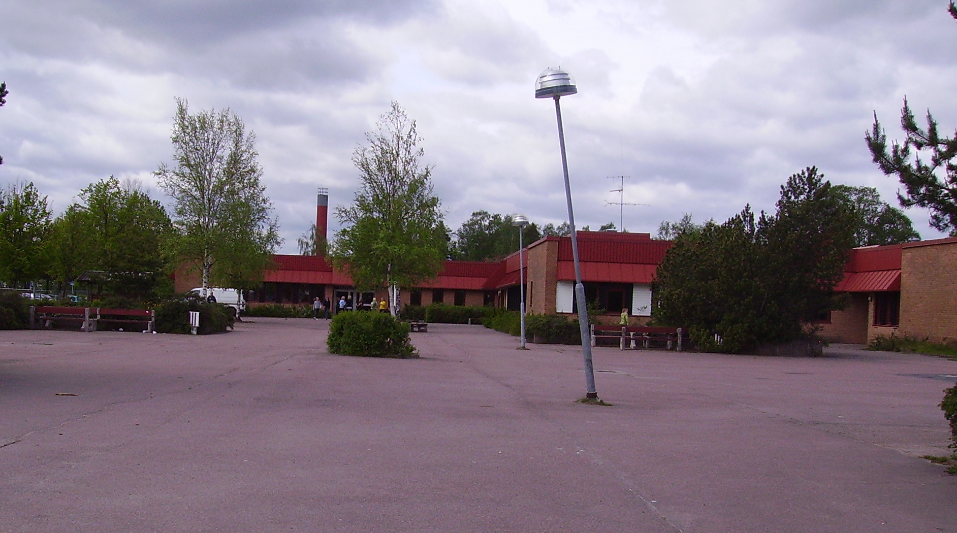 Ilandaskolan ´, Karlstad kommun sett från öst. Arkitekt Olle Dahlén